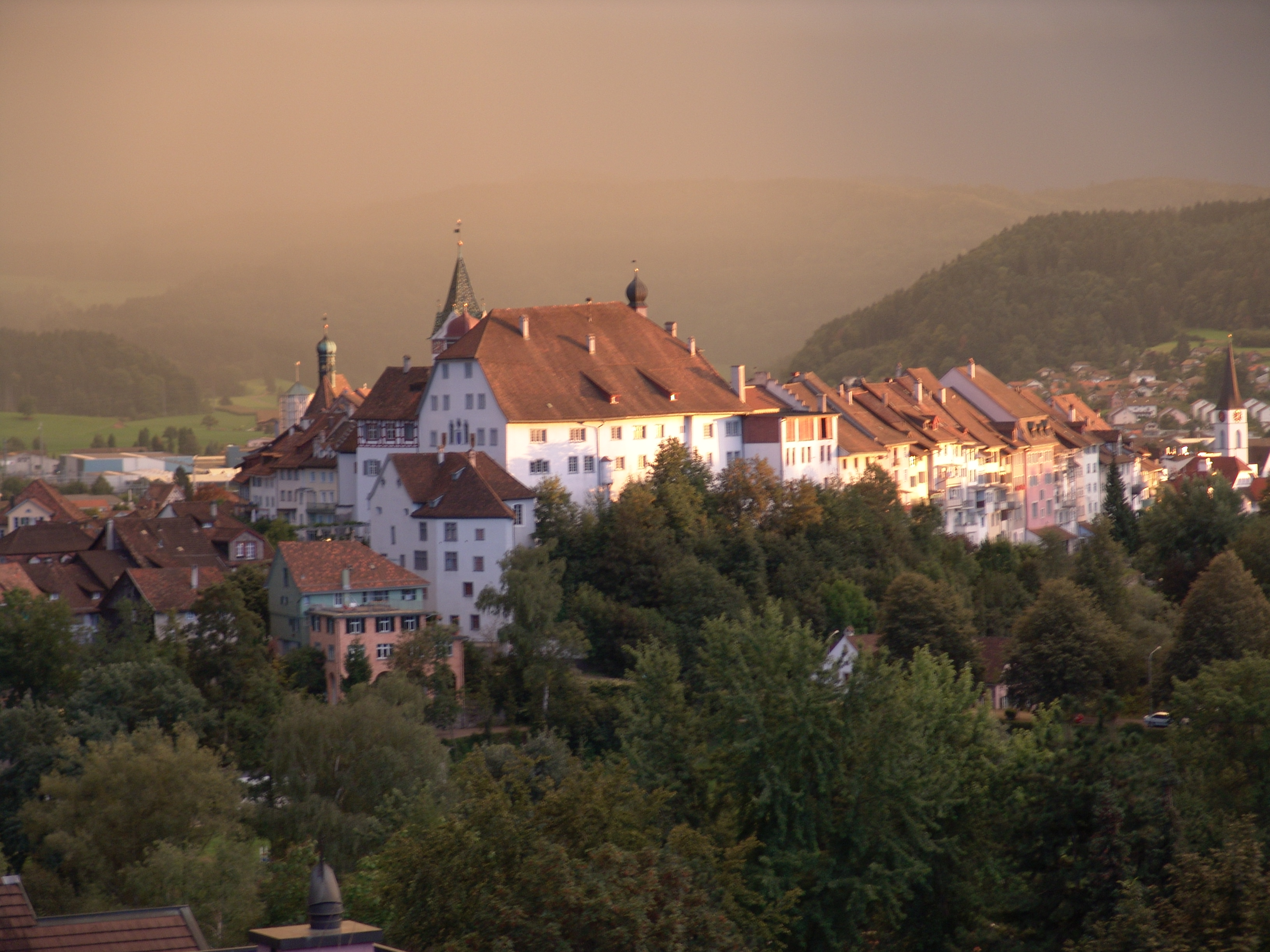 Wil, Wolken über Altstadt